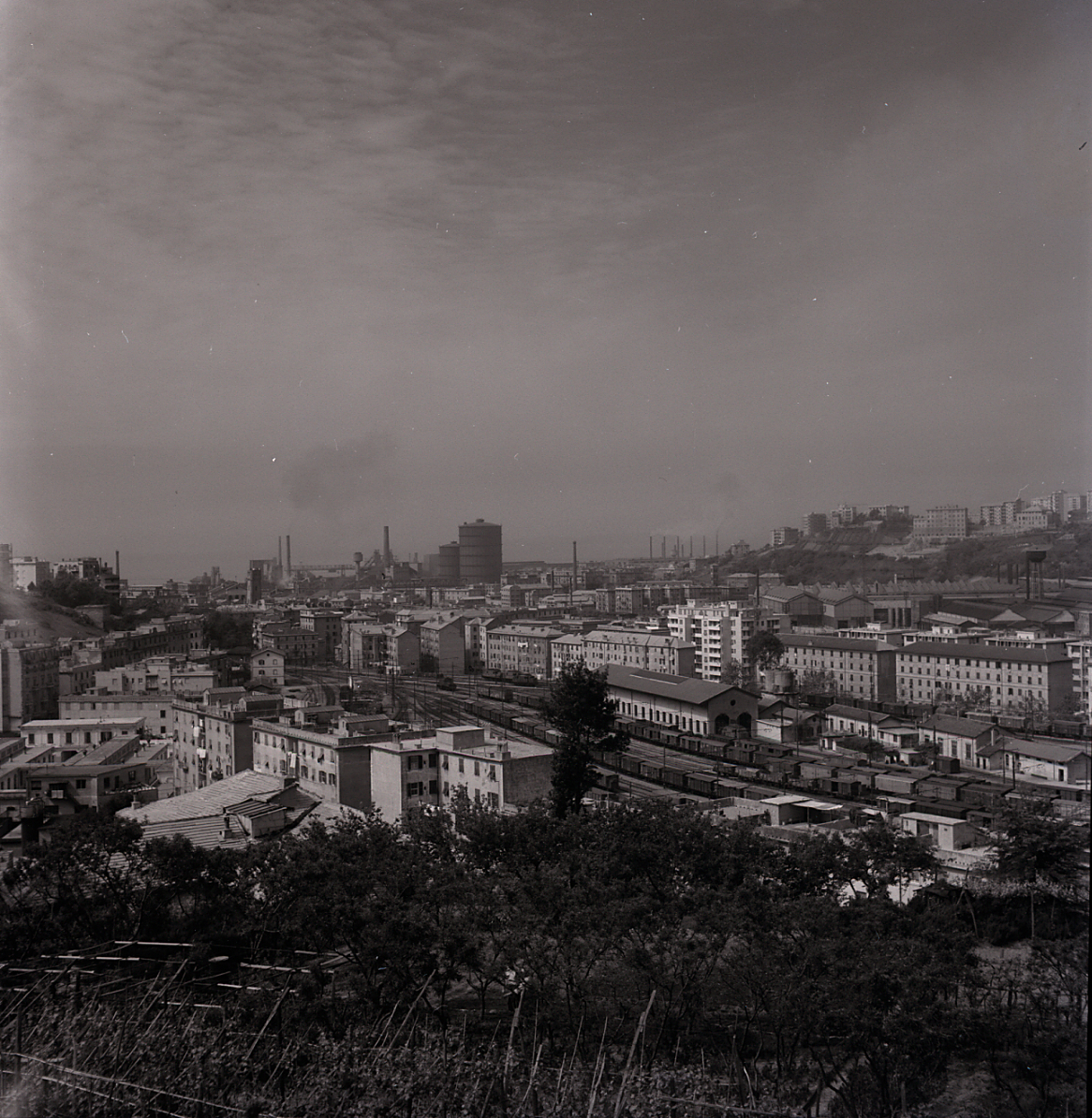 Genova, bassa Val Polcevera, veduta sul parco ferroviario del Campasso, al limite fra i quartieri di Sampierdarena e Rivarolo (Certosa). Sullo sfondo le acciaierie di Cornigliano, con al centro l'altoforno, e la collina di Coronata. Serie fotografica : Genova, 1965 / Paolo Monti. - Buste: 6, Fototipi: 6 : Negativo b/n, gelatina bromuro d'argento/ pellicola ; 6x6. - ((Serie costituita da 6 negativi identificati con i nn.: 8828-8833. Numerazione parallela: 45-50. Sulla busta R8828 manoscritto: "Panorami". La suddetta serie è contenuta nella scatola identificata con la numerazione R8801/9173. Sul coperchio iscrizione manoscritta a pennarello: "Genova".